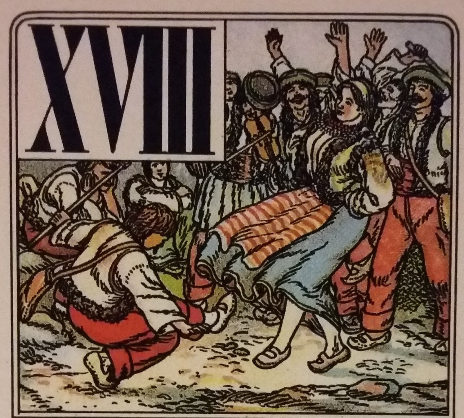 Smrekarjev tarok.